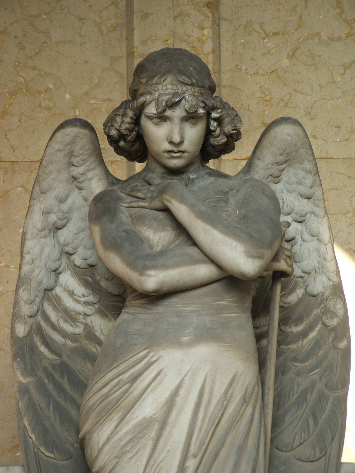 Cimitero monumentale di Staglieno, Genova, tomba Oneto - statua dell'Angelo, di Giulio Monteverde.